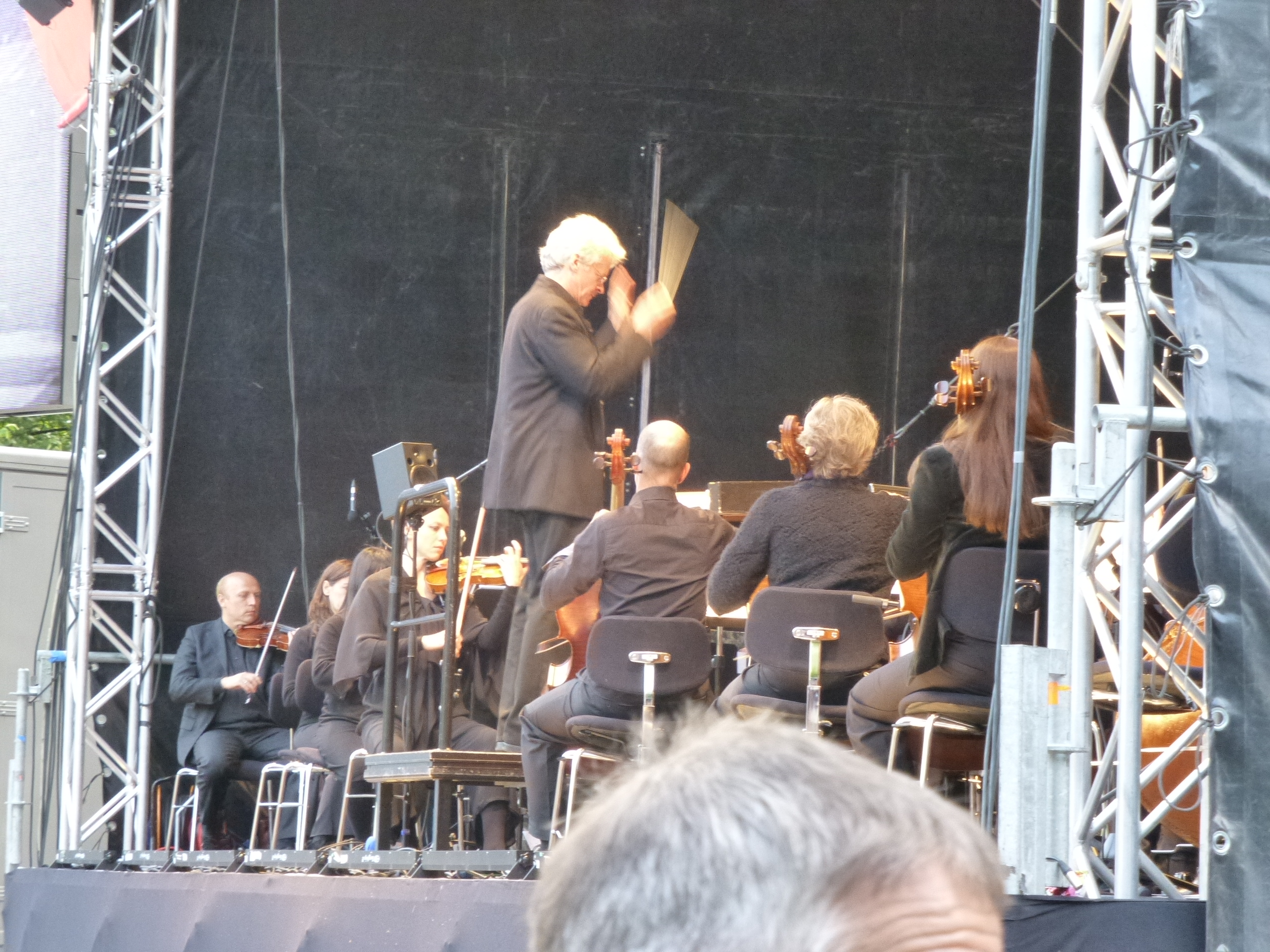 Open-Air-Konzert des Sinfonieorchester Wuppertal am 12. Juli 2013 ab 20:00 auf dem Laurentiusplatz, Wuppertal. Geboten wurde Stummfilm & Livemusik, Charlie Chaplin: "Modern Times"